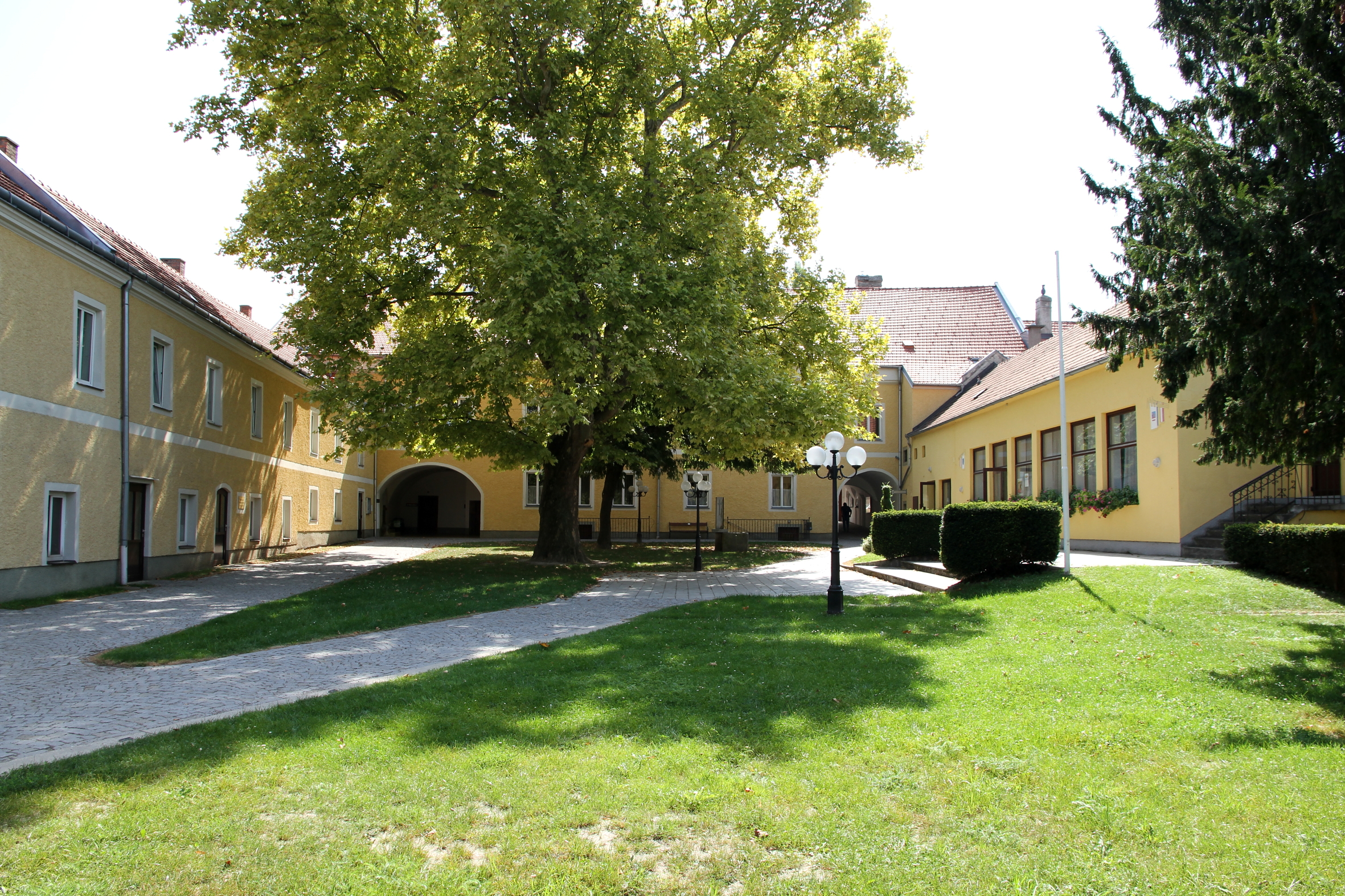 Schloss Königstetten in der niederösterreichischen Marktgemeinde Königstetten.